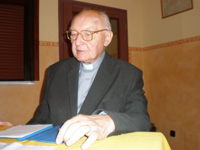 fotografii vyfotila Mgr. Veronika Čepelková při příležitostí exercicií s Mons. ThLic. Bohumilem Kolářem